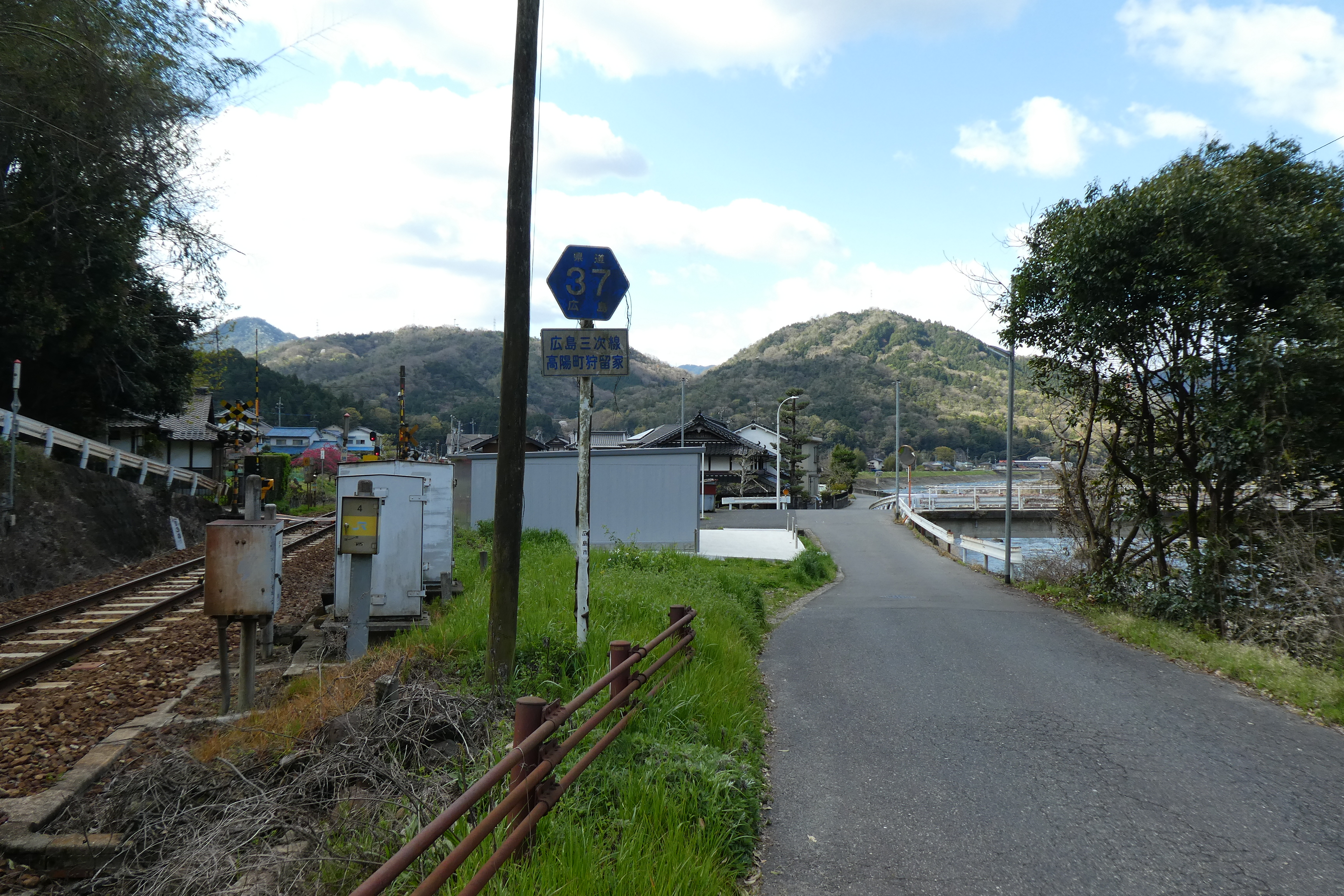 広島県道37号、広島市狩留家の旧道